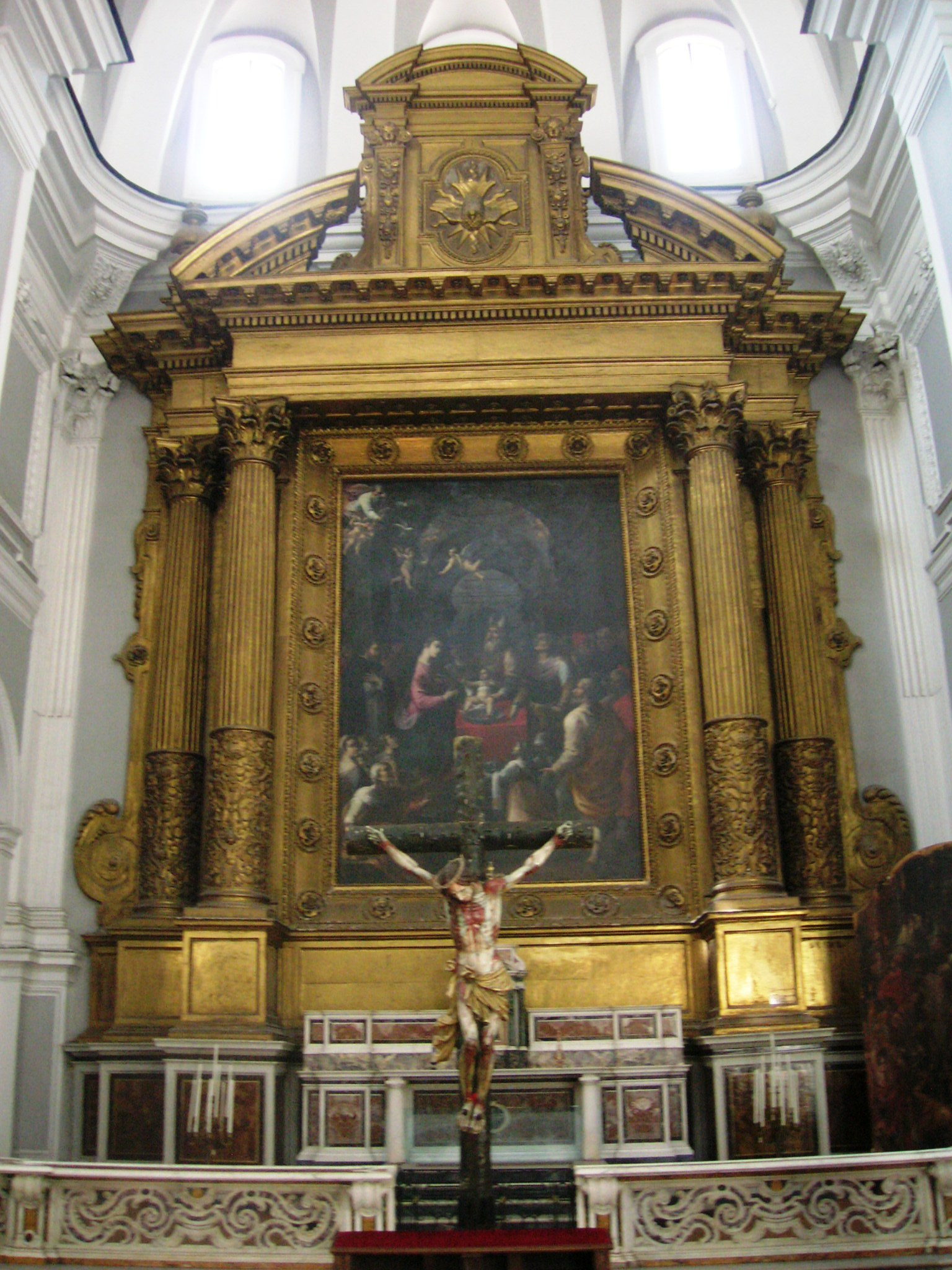 Basilica di Santa Maria della Sanità